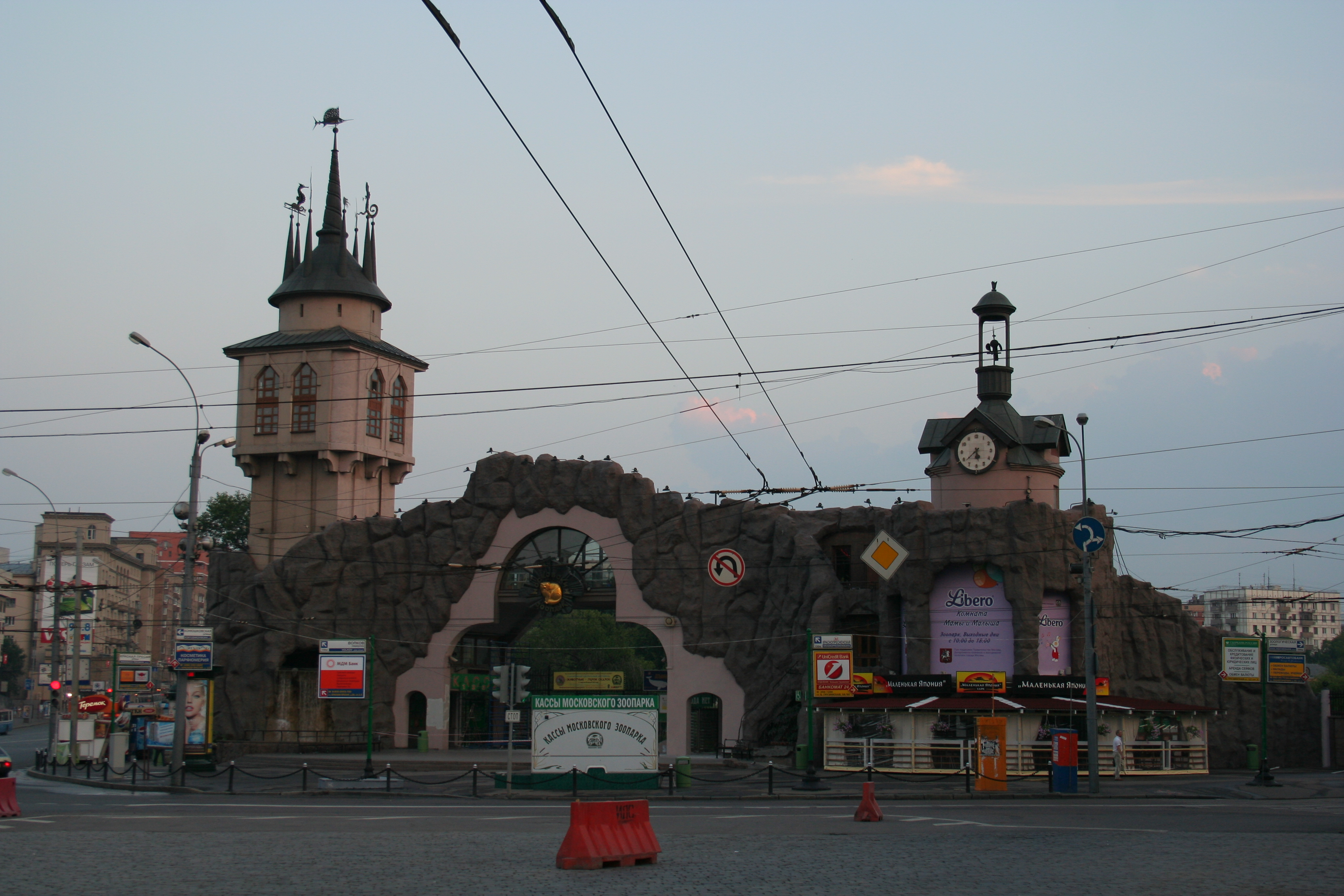 Eingangsbereich des Moskauer Zoos.